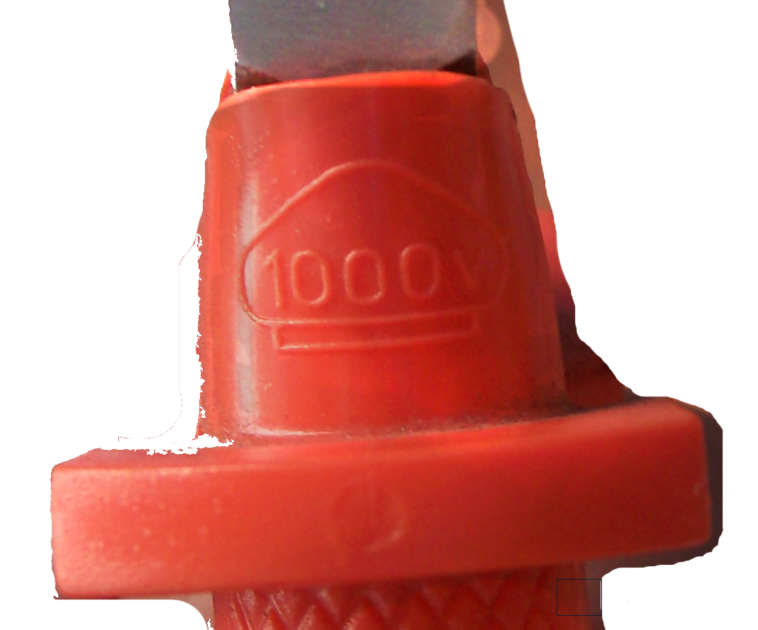 Marca de Isolação